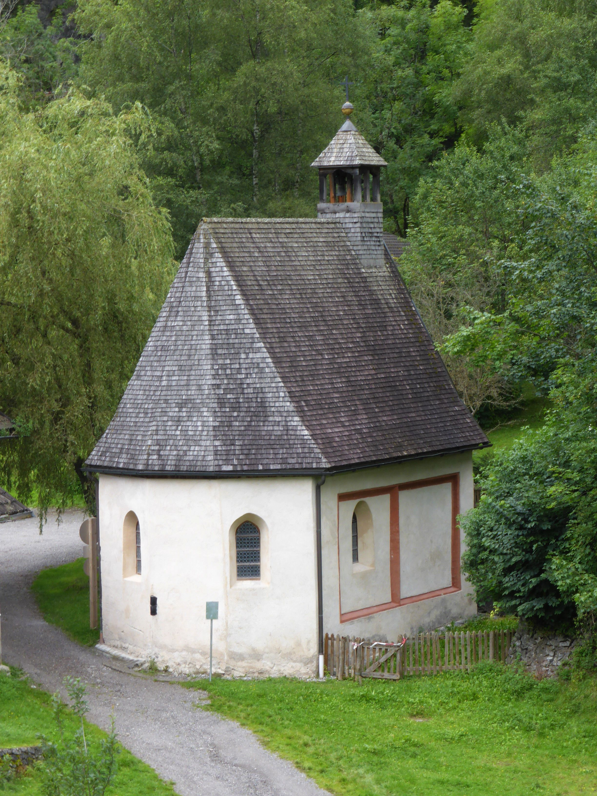 14-Nothelfer-Kapelle/Fernpasskapelle